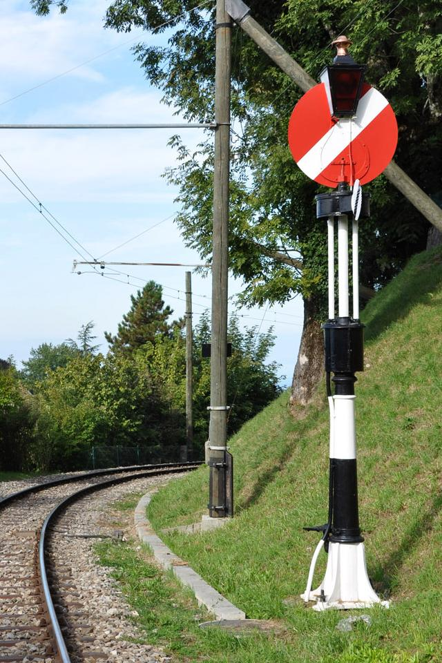 Hippsche Wendescheibe an der Bahnstrecke Blonay–Chamby zwischen Blonay und Chantemerle.